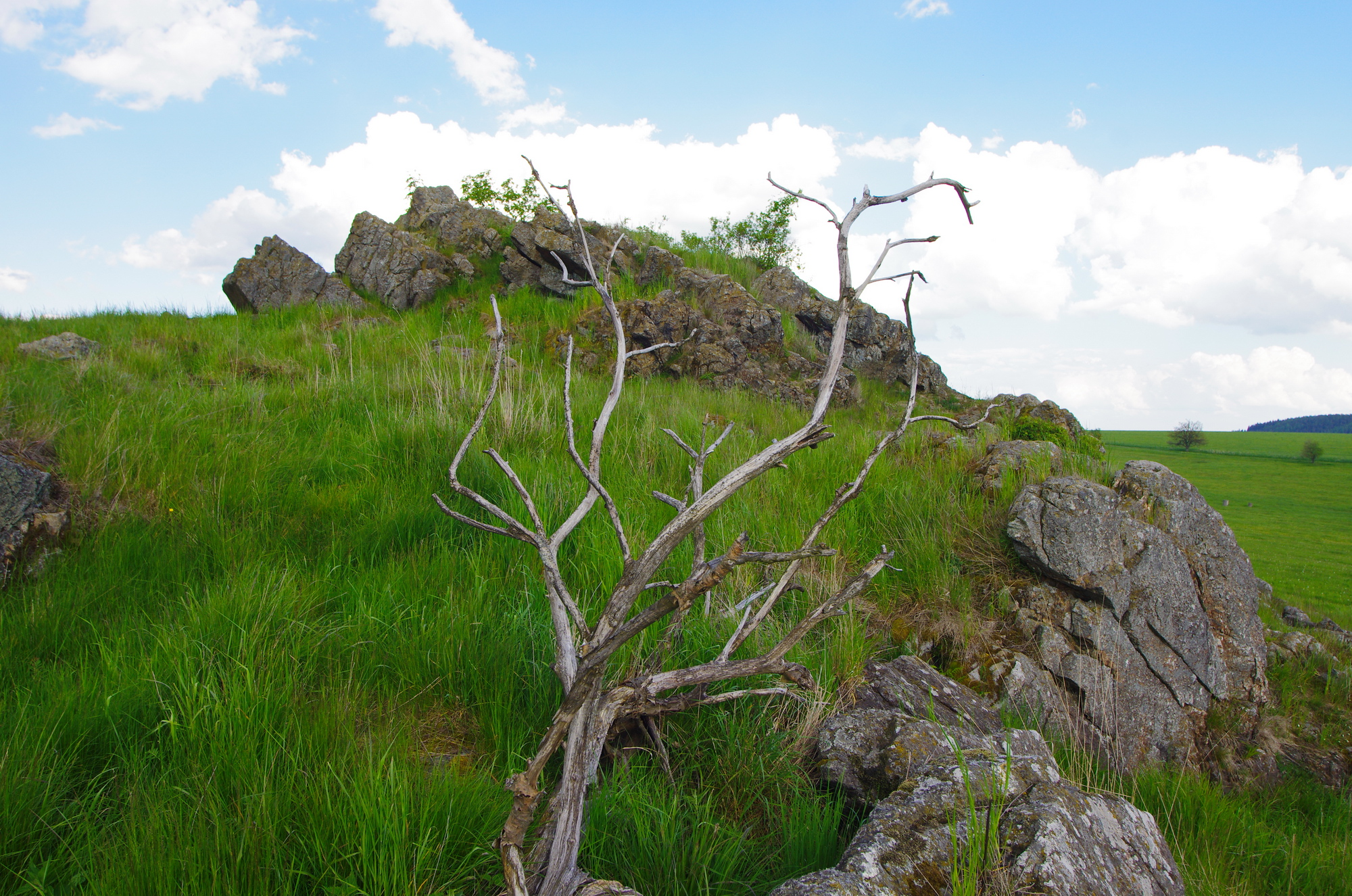 Evropsky významná lokalita Pramenské pastviny, Slavkovský les, okres Cheb